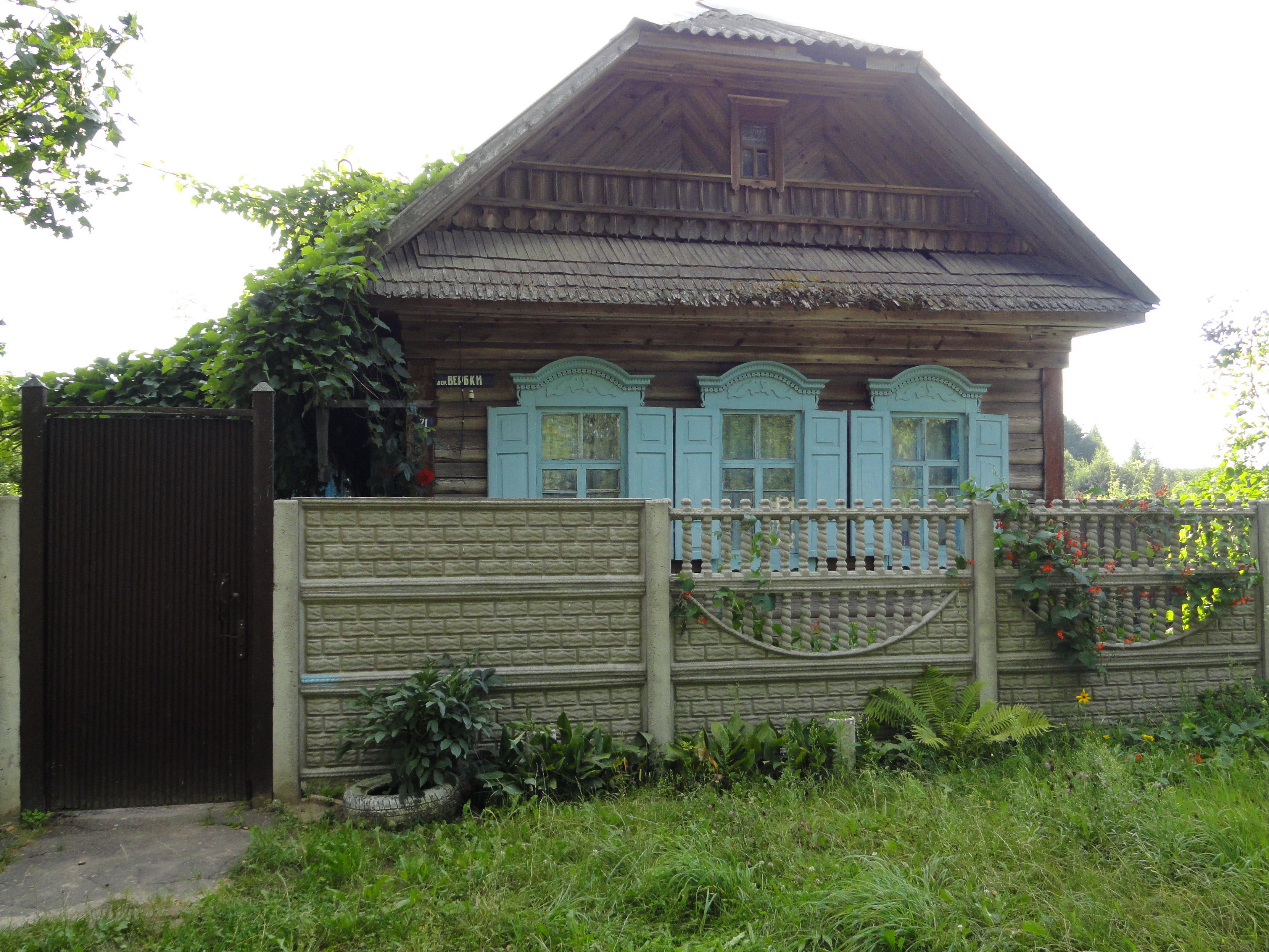 Вербки, Бобруйский район